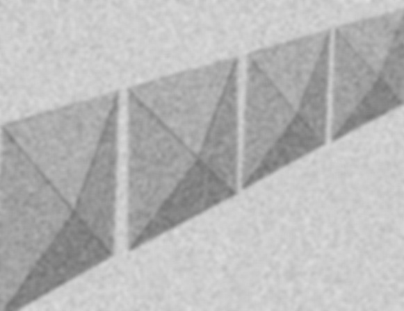 Bossages en pointes de diamant.